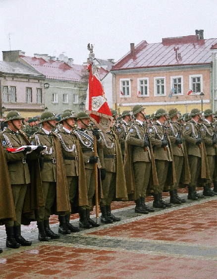 21 Brygada Strzelców Podhalańskich. Sanok 8 grudnia 2007. Przysięga wojskowa.